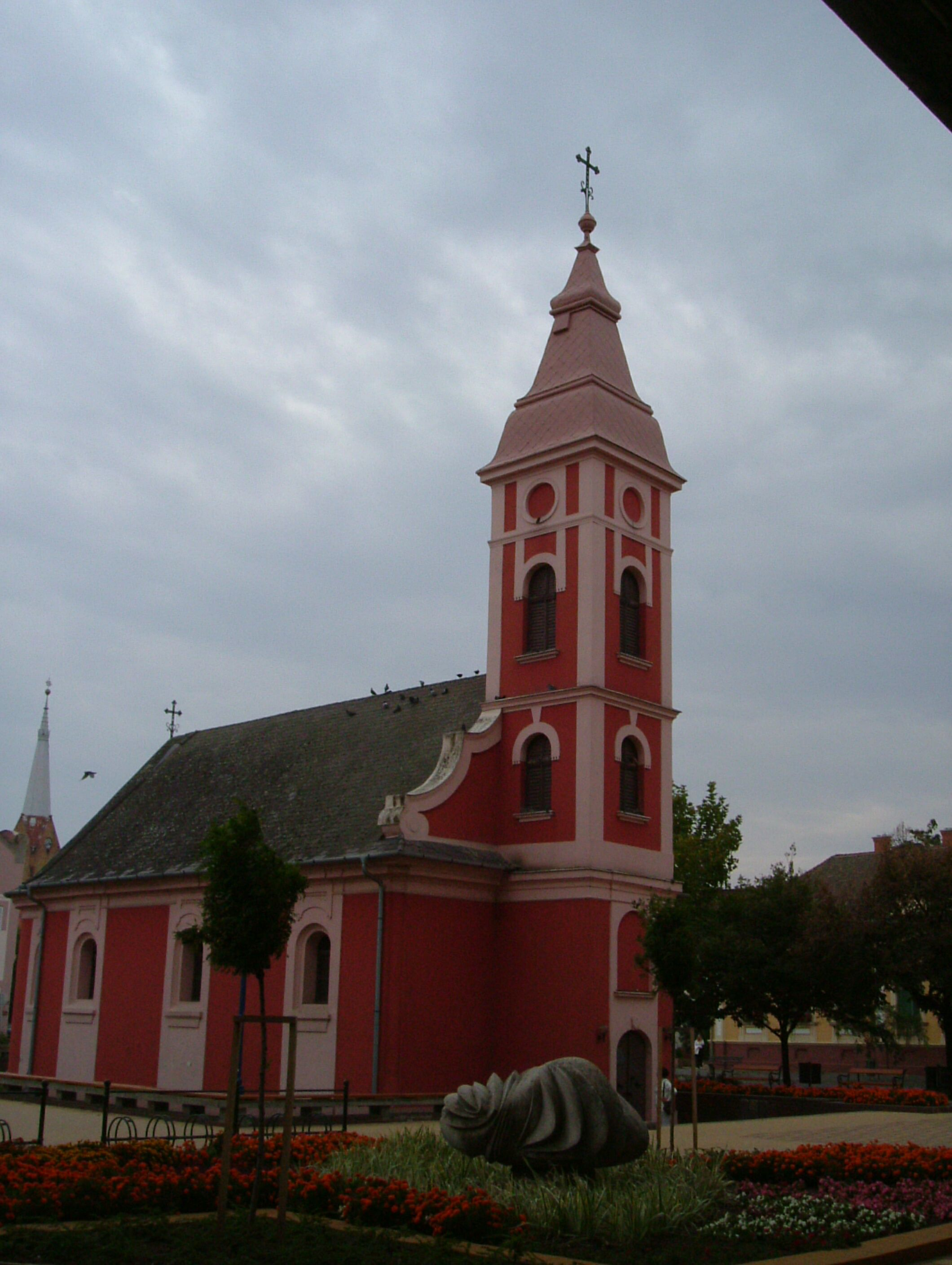 Szentes. Orthodox Church